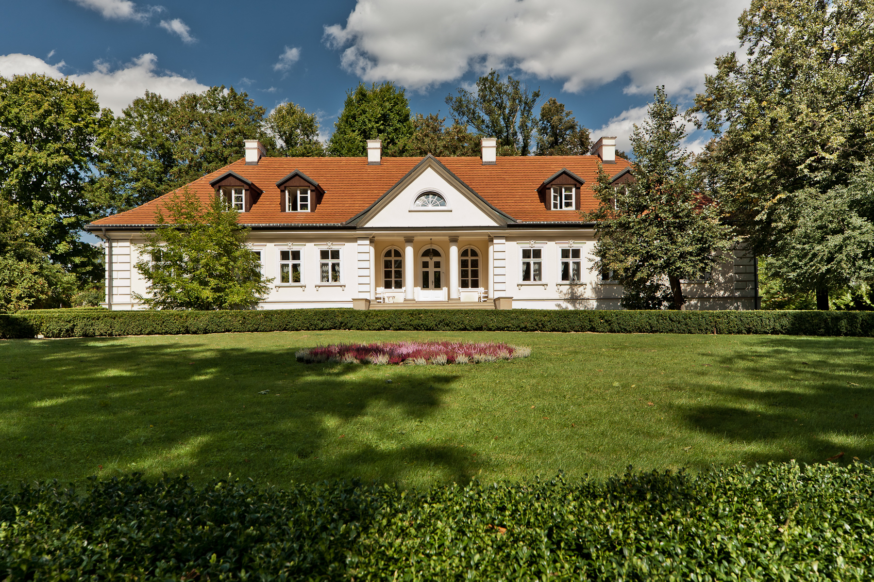 Zespół dworski, Tomaszowice - widok na dwór